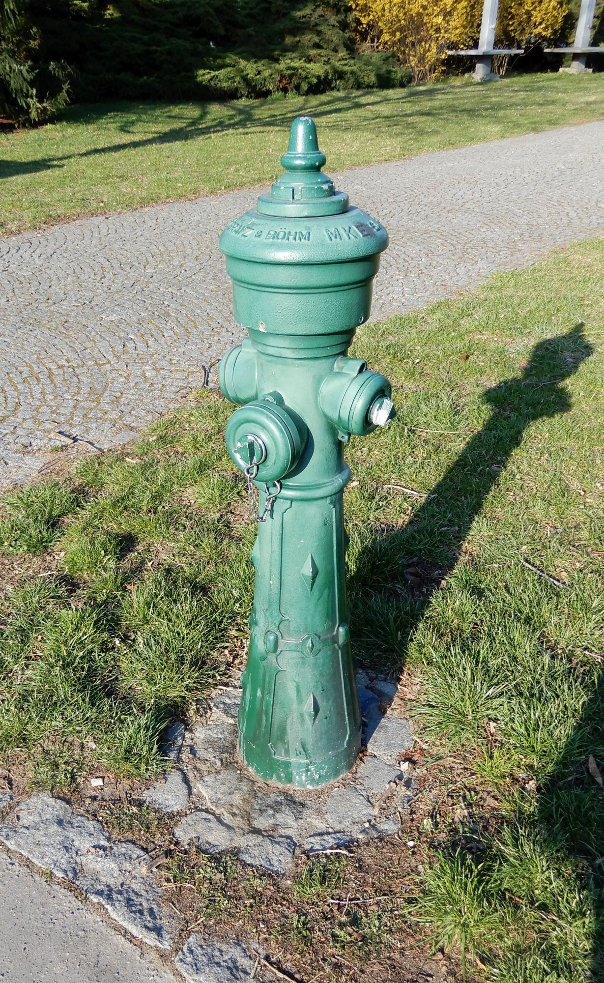 Hydrant firmy Böhm, Praha 6 - Na Petřinách